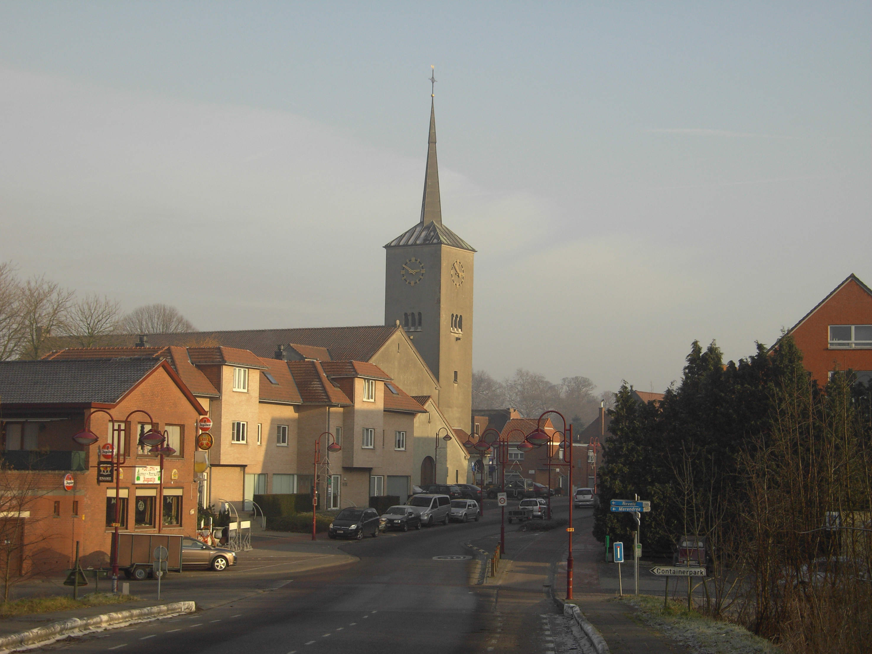 Dorpszicht van Landegem - gezien van aan de brug over de Schipdonk - België